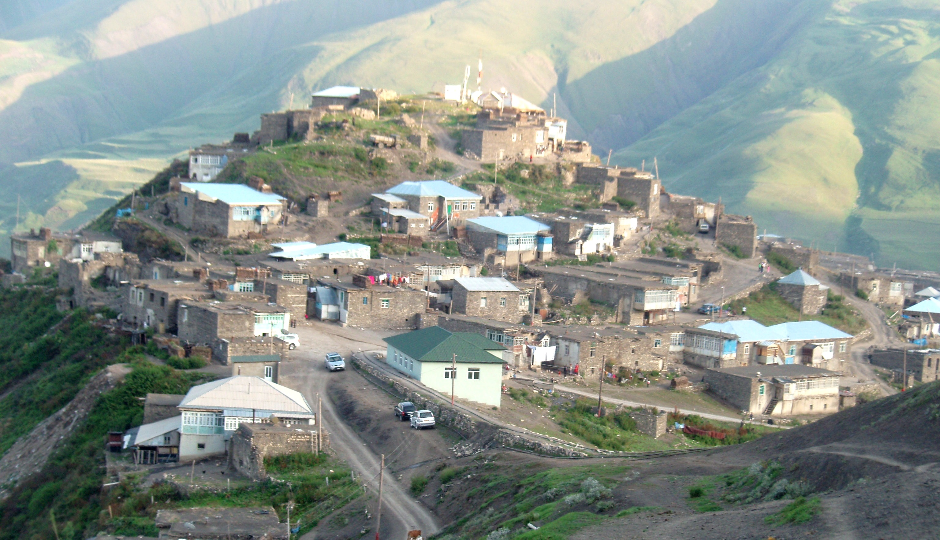 Xınalıq, avqust 2009